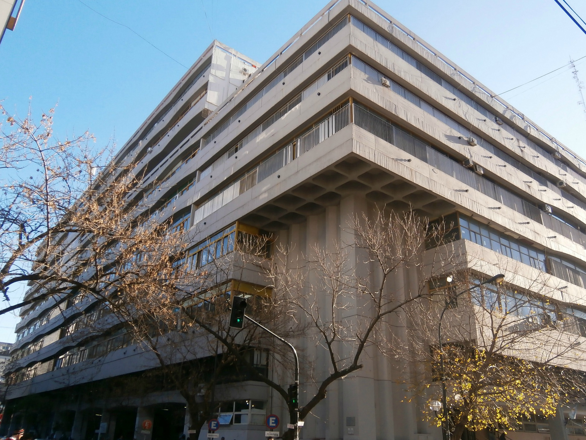 Edificio Tres Facultades de la Universidad Nacional de la Plata. Vista de la esquina de calles 6 y 47.